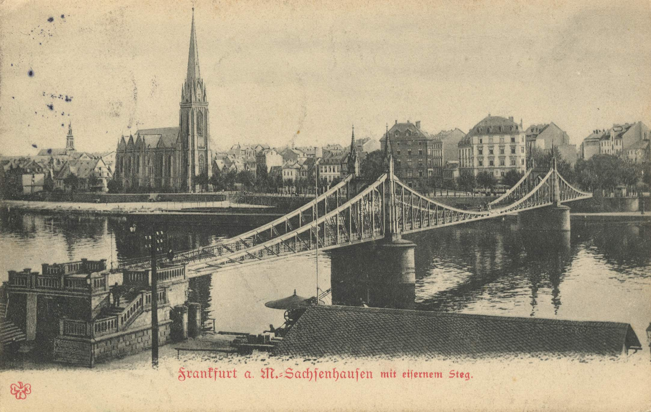 Eiserner Steg in Frankfurt am Main auf einer Postkarte von 1905. Im Hintergrund: Alt Sachsenhausen mit der Dreikönigskirche.